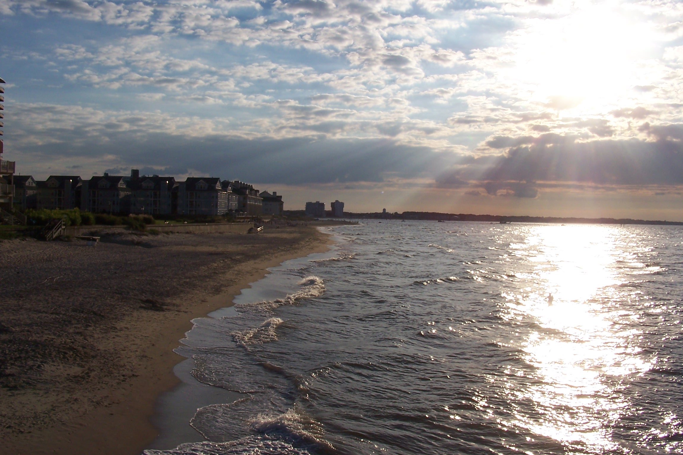 Coucher de soleil à Virginia Beach